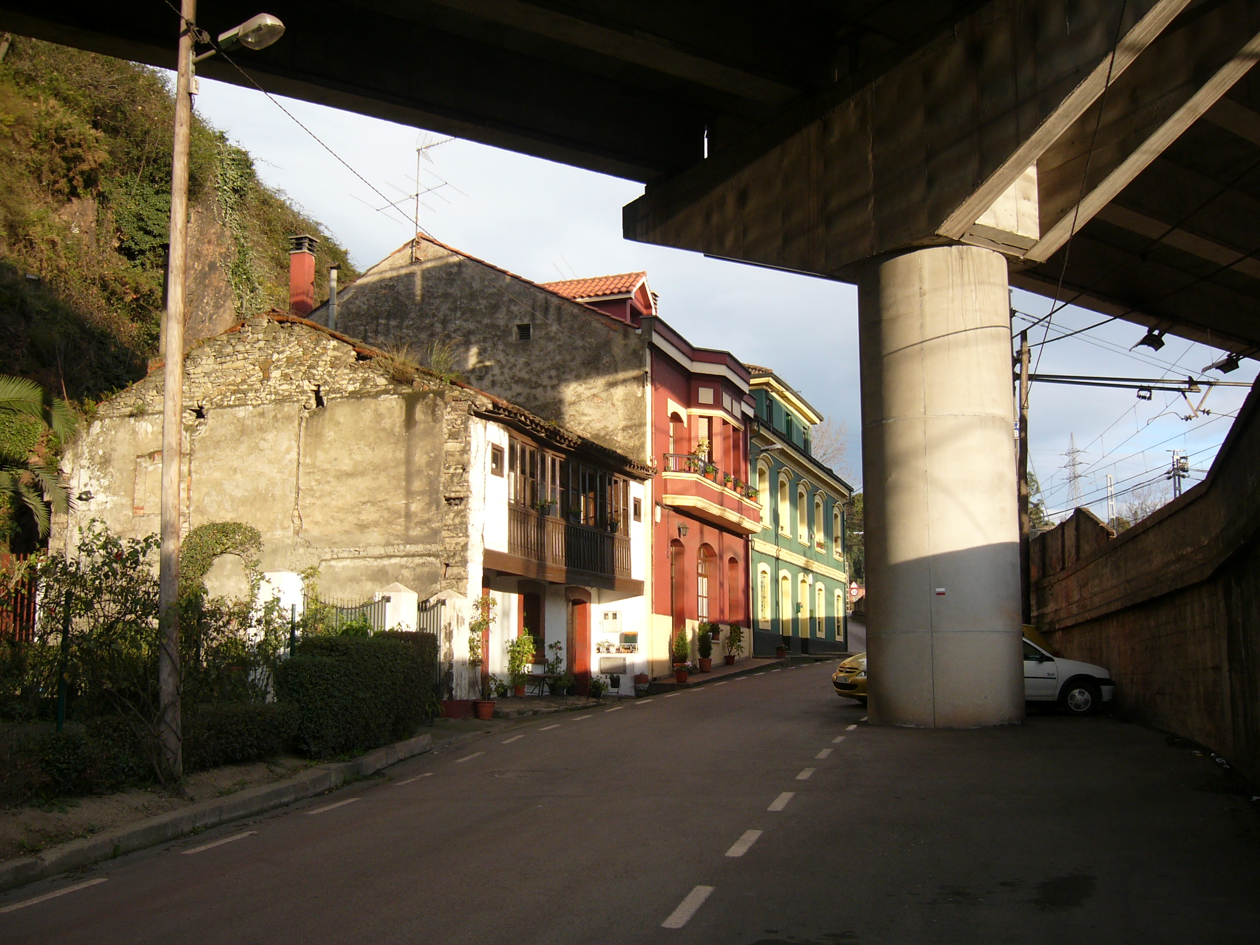 Veriña (Xixón - Asturies - Spain)